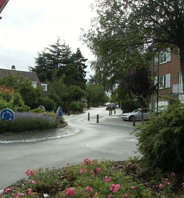 Av du Kouter, Auderghem, Belgium part 2